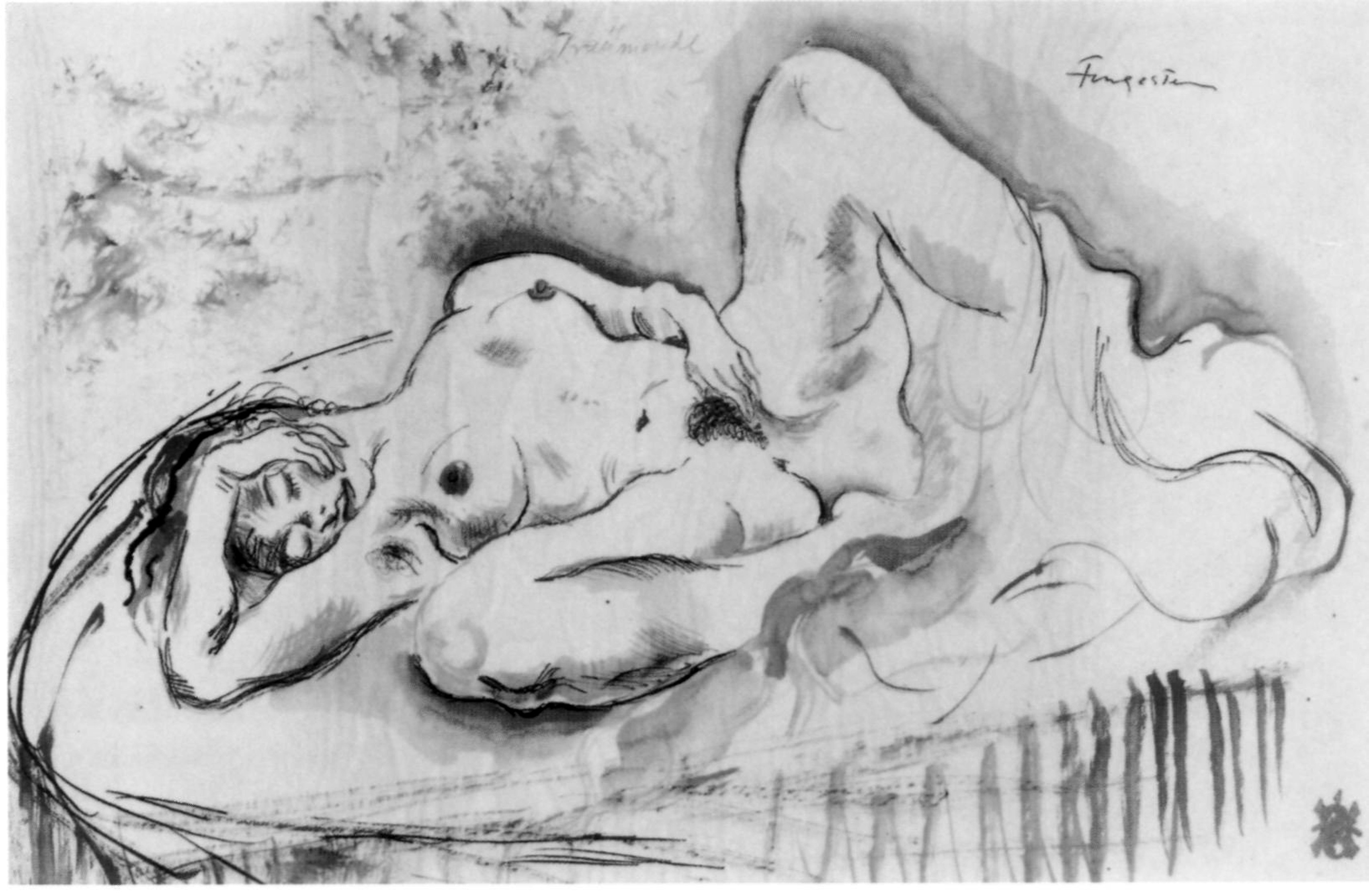 Pracht-Mappe "Improvisationen über das Thema Liebe", 1923 von Fingesten selbst eigens für den Sammler Heinrich Stinnes zusammengestellt.